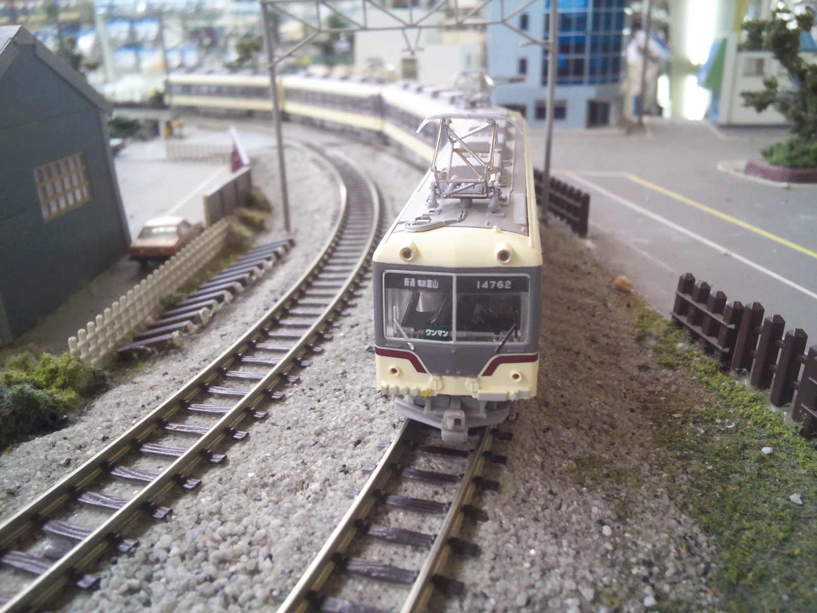 鉄道コレクション14760